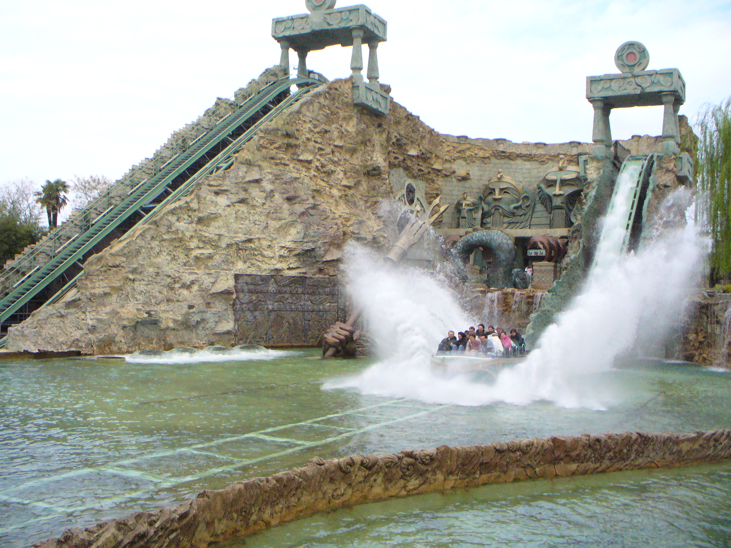 Fuga da Atlantide a Gardaland, la seconda discesa del percorso